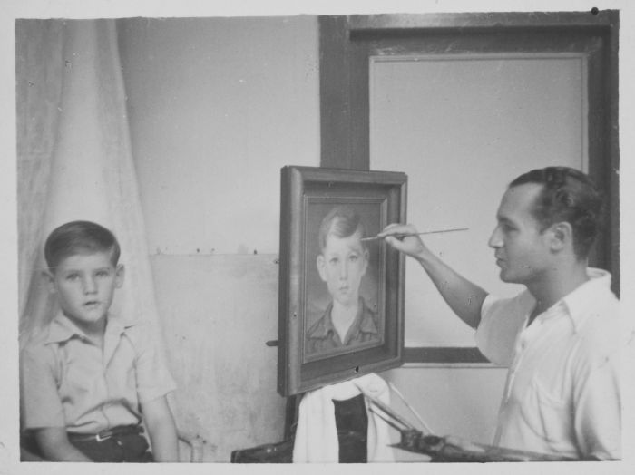 Foto. Charles Sayers met model, werkend aan een olieverfschildering voorstellende een jongenskopje